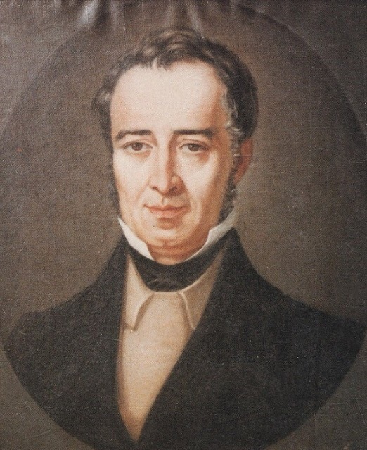 Francesco Romani, per Cesario Giacomucci, Pinacoteca Civica di Palazzo d'Avalos, Vasto.